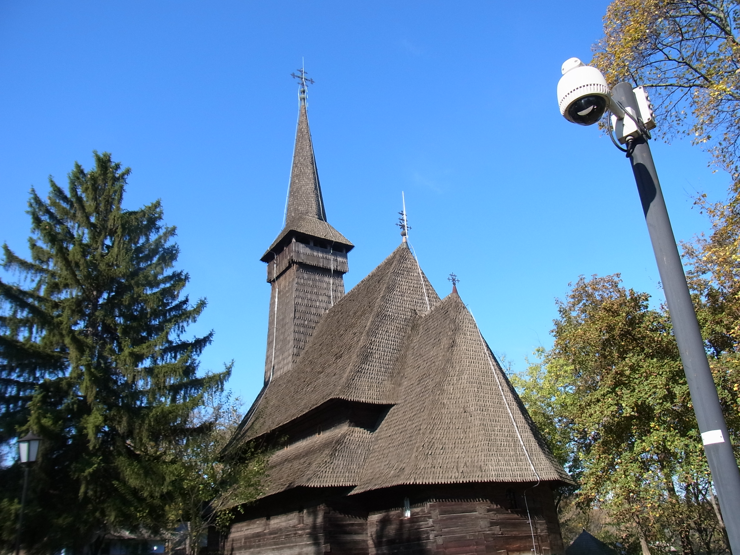 MUZEULUI NAȚIONAL AL SATULUI „Dimitrie Gusti”